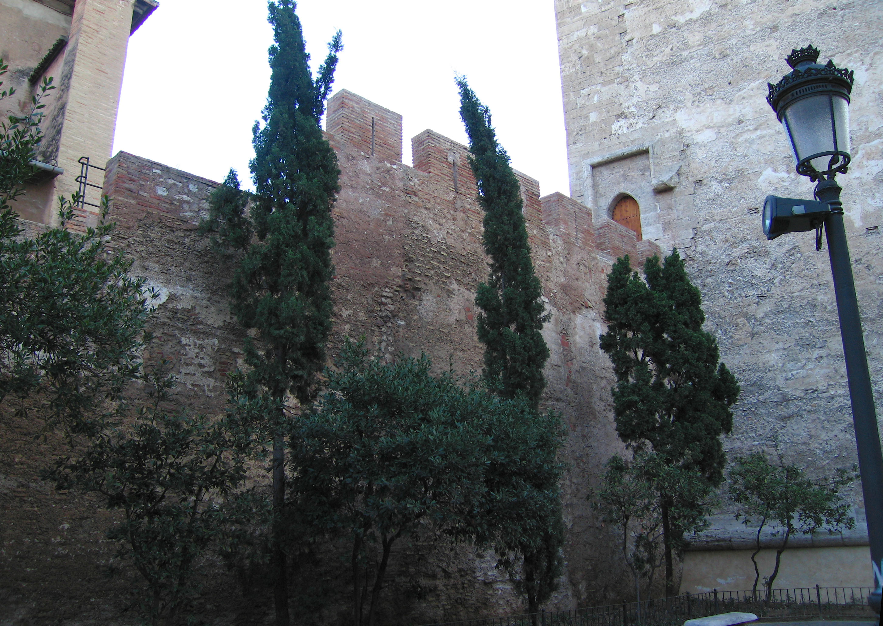 muralla de València